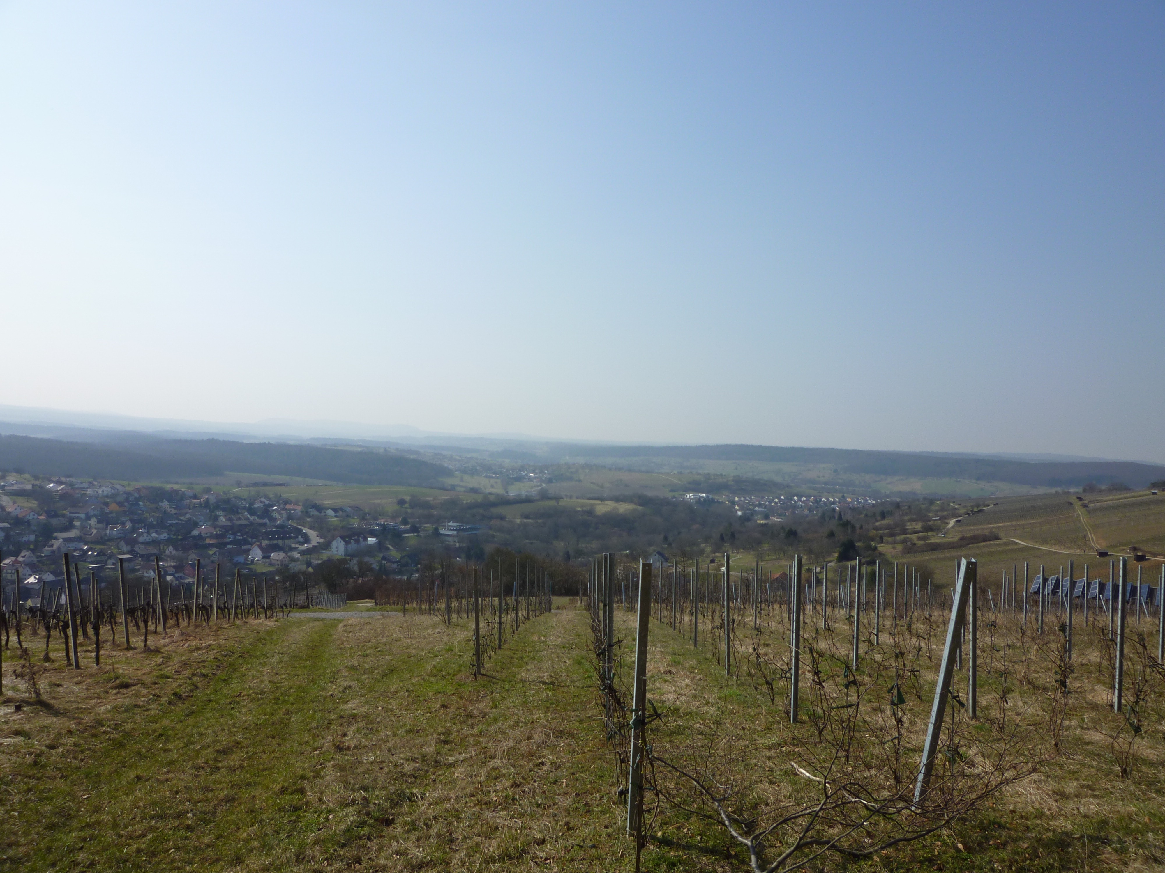 Blick vom Nordrandweg (Schwarzwald) nach Süden: Weinberge über Dietlingen im Hintergrund Ellmendingen